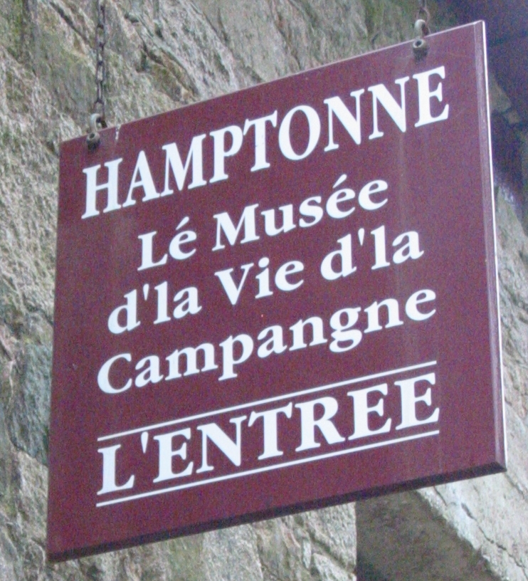 Nrf: La Faîs'sie d'Cidre à Hamptonne 2007